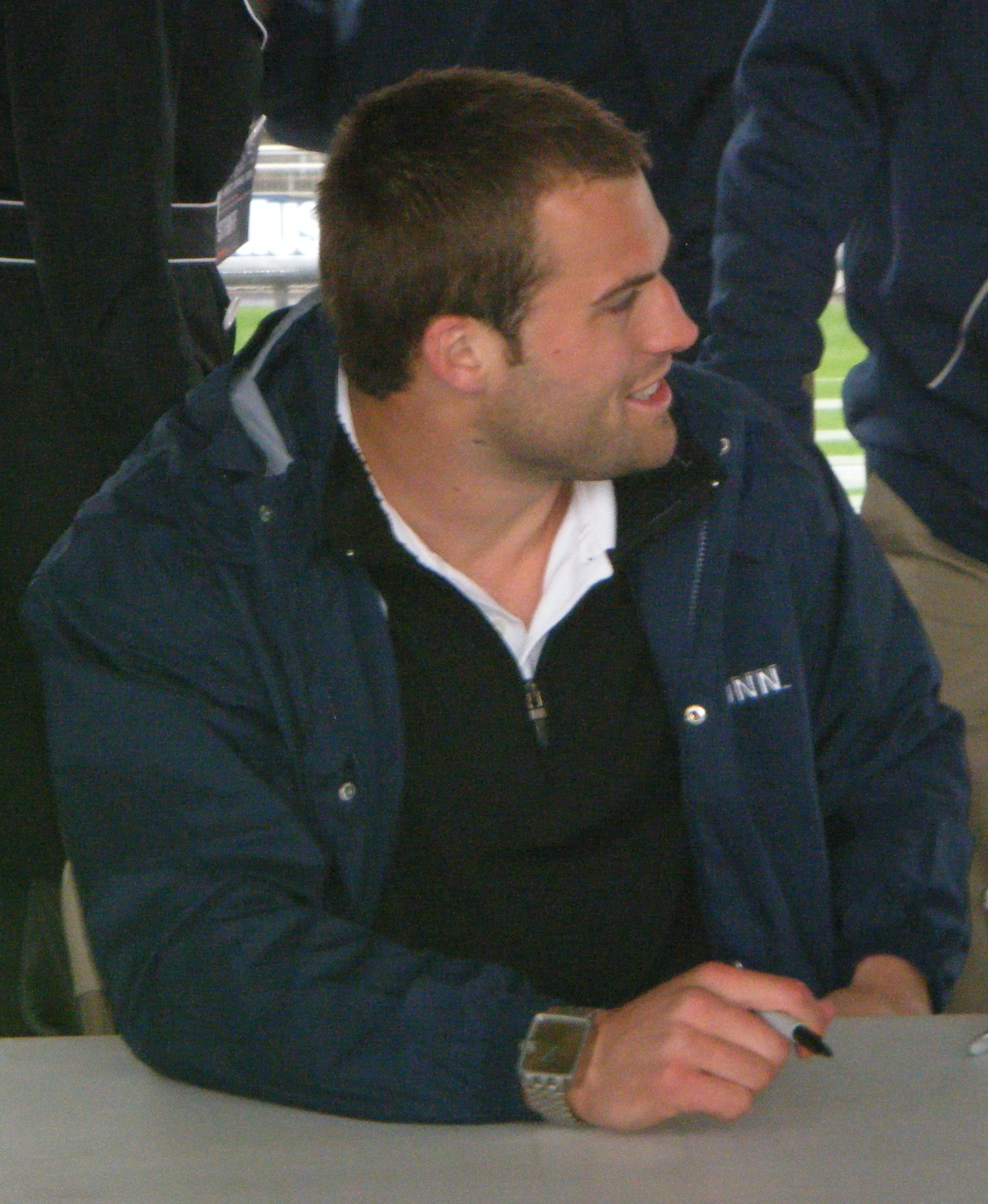 Tyler Lorenzen signing autographs at the 2010 UConn Spring Game at Rentschler Field.